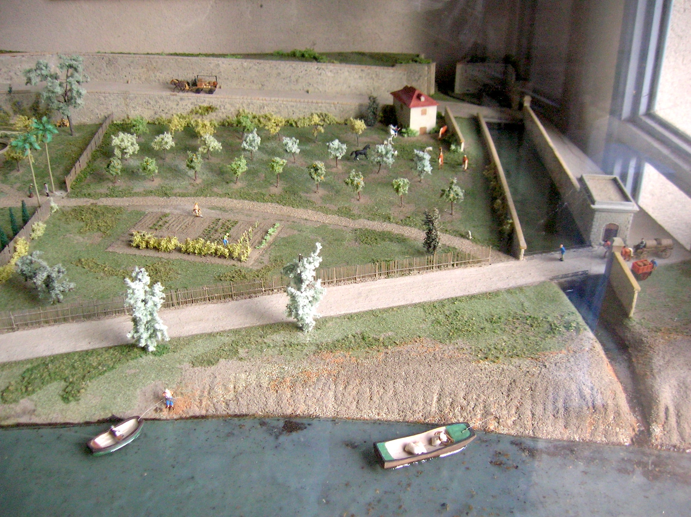 Casamaures, Saint-Martin-le-Vinoux, Isère, France.